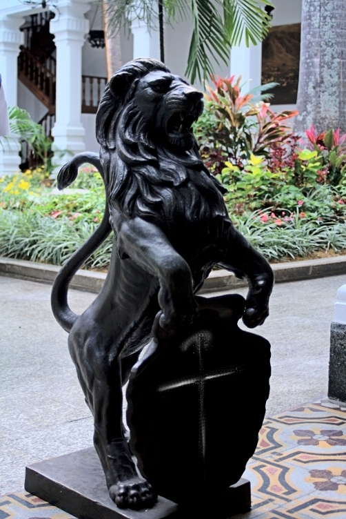 Simbolo de Caracas